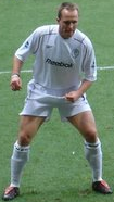 Henrik Pedersen. Image cropped from original at flickr.